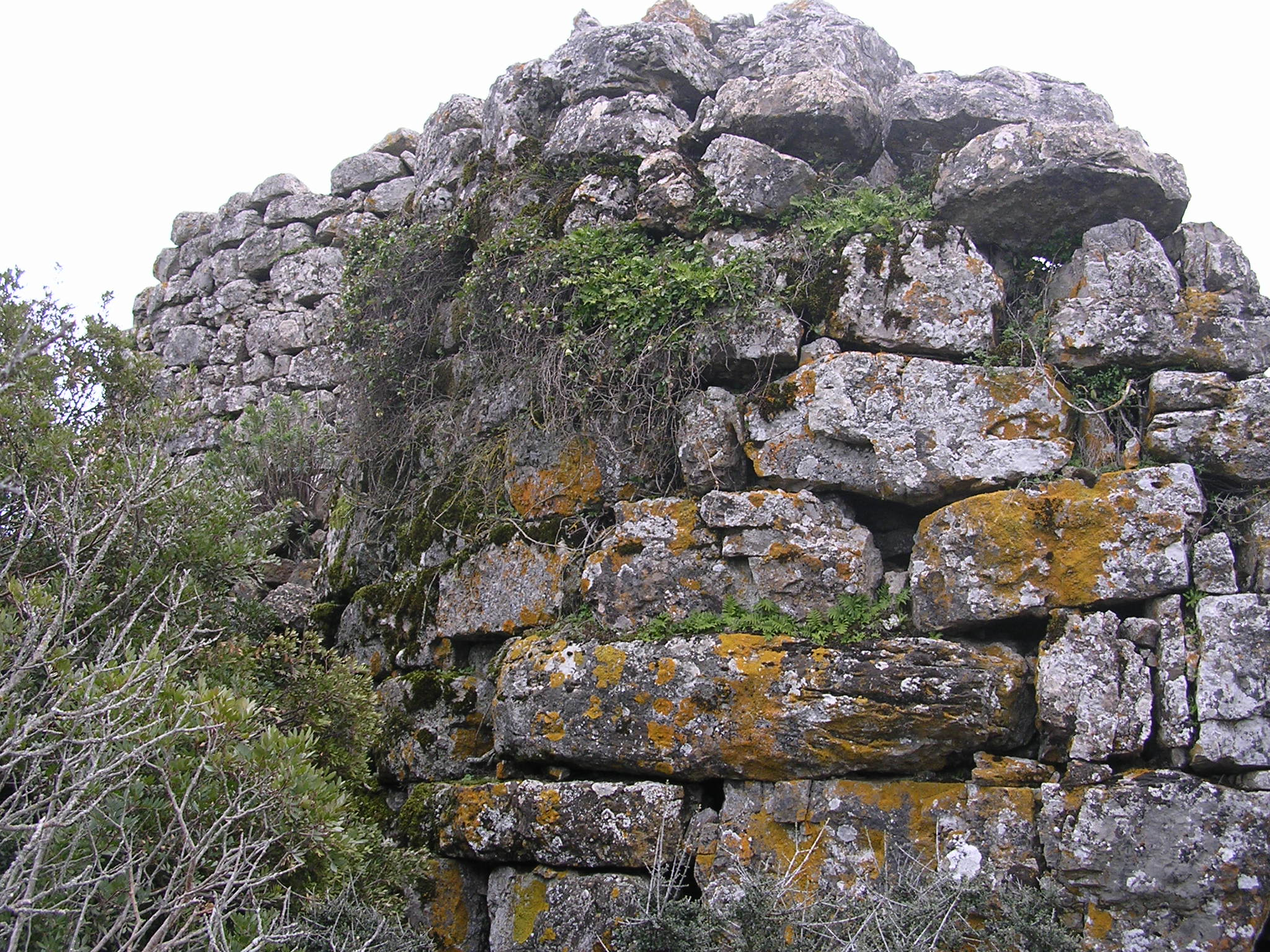 Seconda torre del Nuraghe s'Ulimu di Ulassai in parte crollata